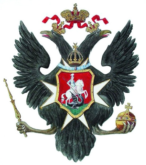 Герб Российской империи времён Павла I. 1799. Бумага, акварель. Государственный Эрмитаж. С.-Петербург